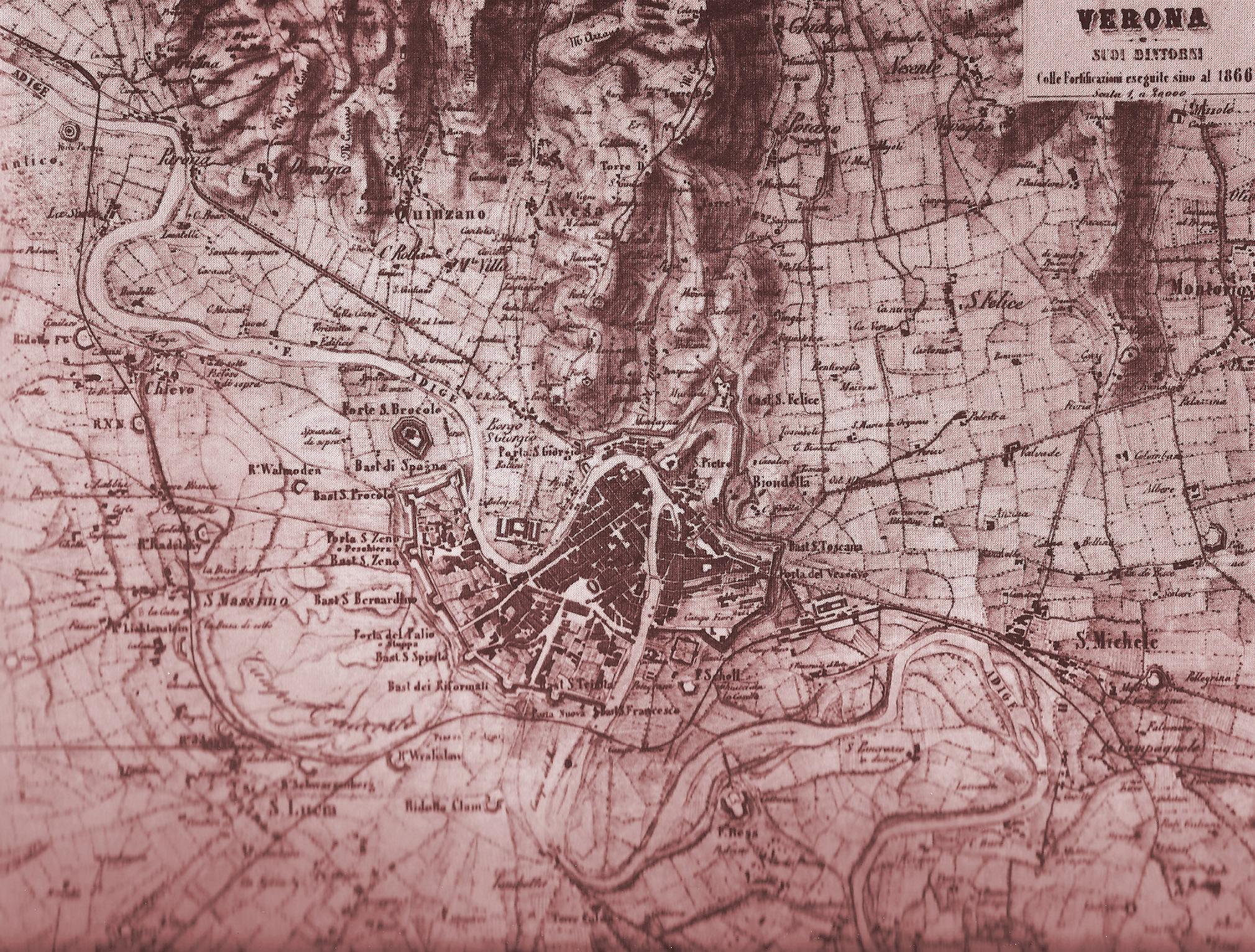 Fonte: "La piazzaforte di Verona sotto la dominazione austriaca 1814-1866 (edizione 1980)" Mappa di Verona nel 1866 Licensing Categoria:Immagini di Verona